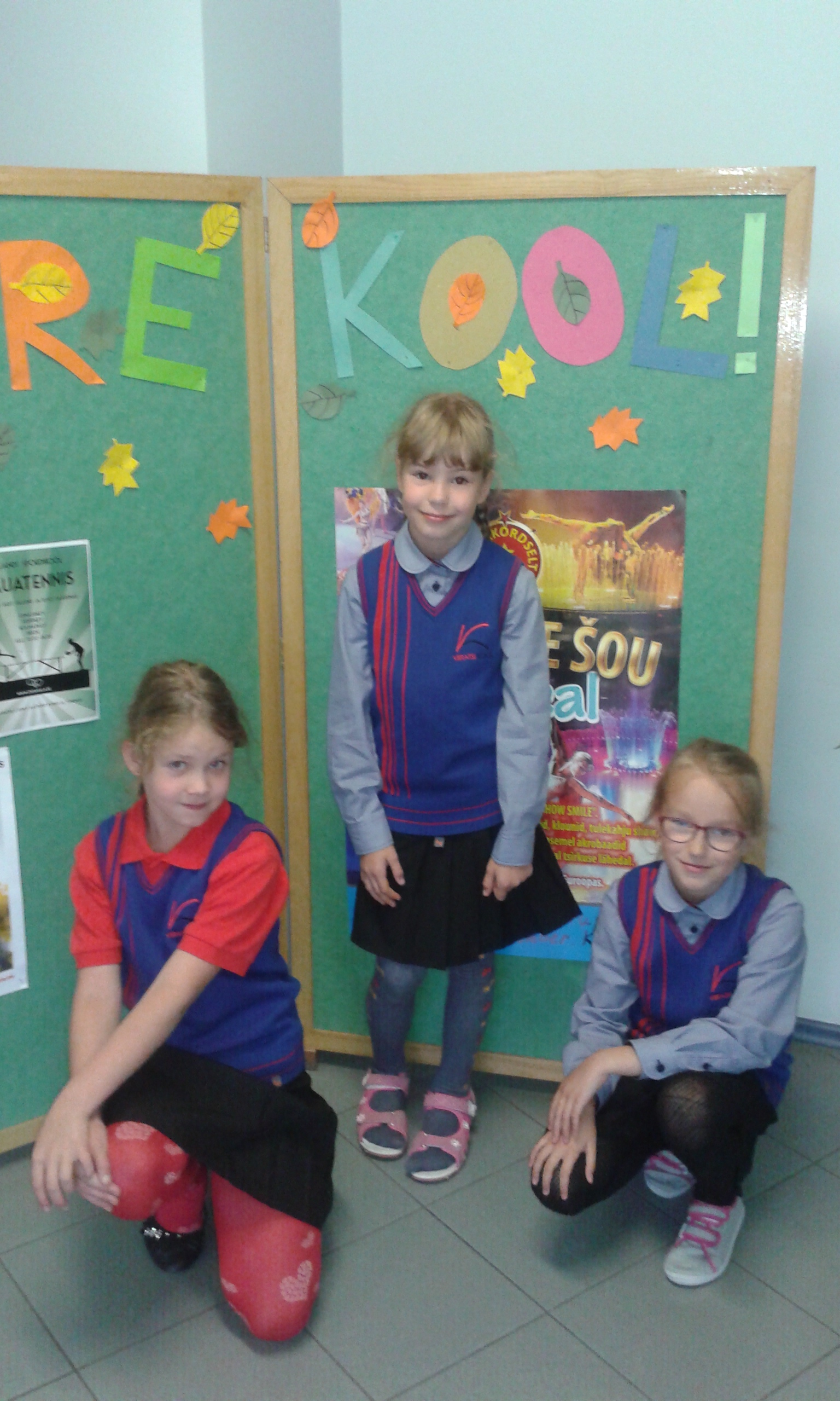 Koolivormi kantakse alates 2014. aastast